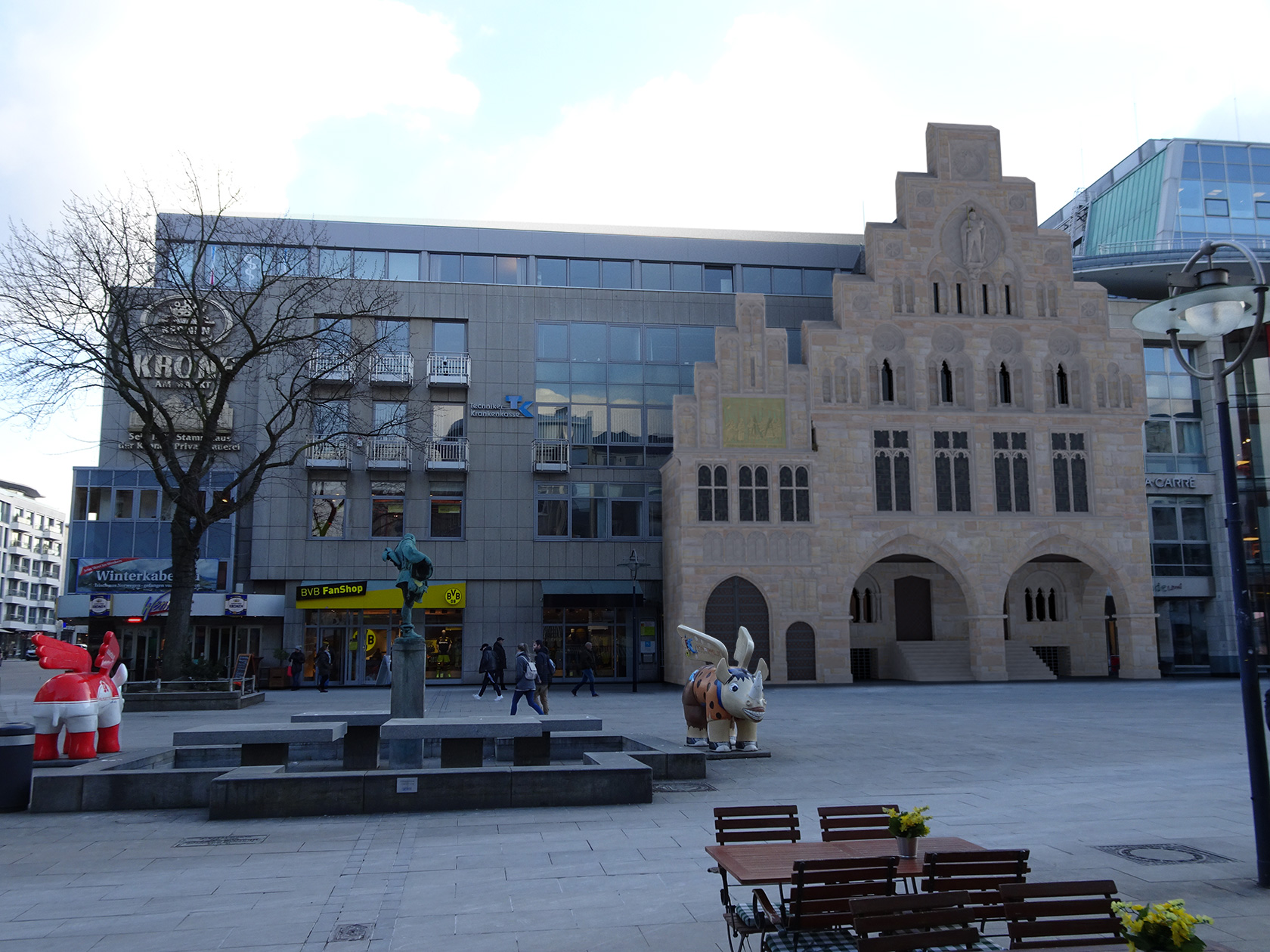 Lage des Rathauses an der Südseite des Markts heute. Das Bild ist eine Fotomontage. Der Kronenkomplex liegt zurückversetzt gegenüber dem Rathaus, da die Baulinie nach dem 2. Weltkrieg nach Süden verschoben wurde.